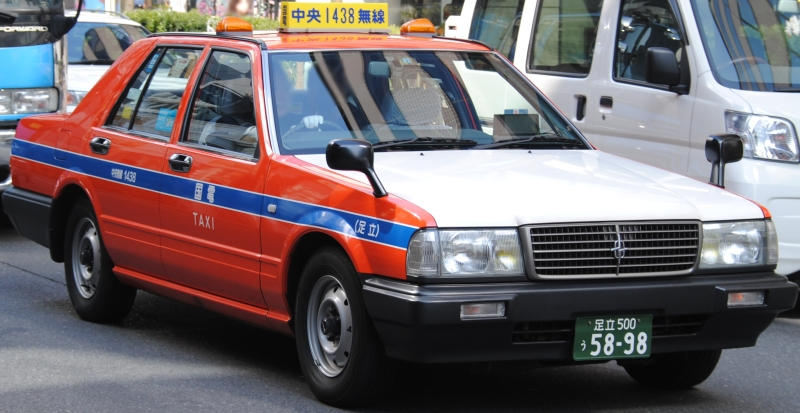 中央無線（国際電気）のタクシー